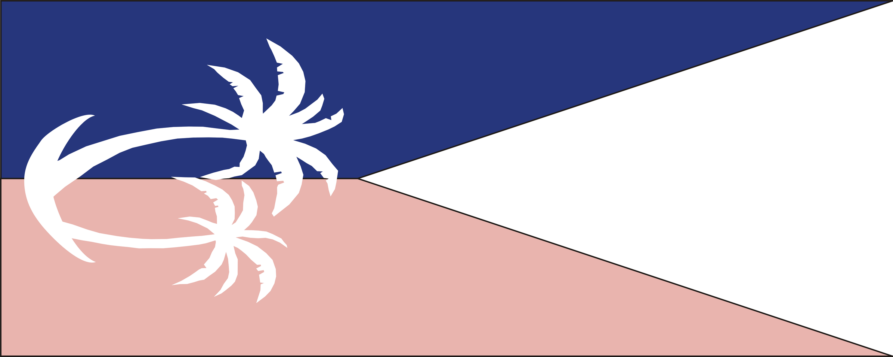 Proporczyk 4 Pułku Ułanów Karpackich (PSZ)